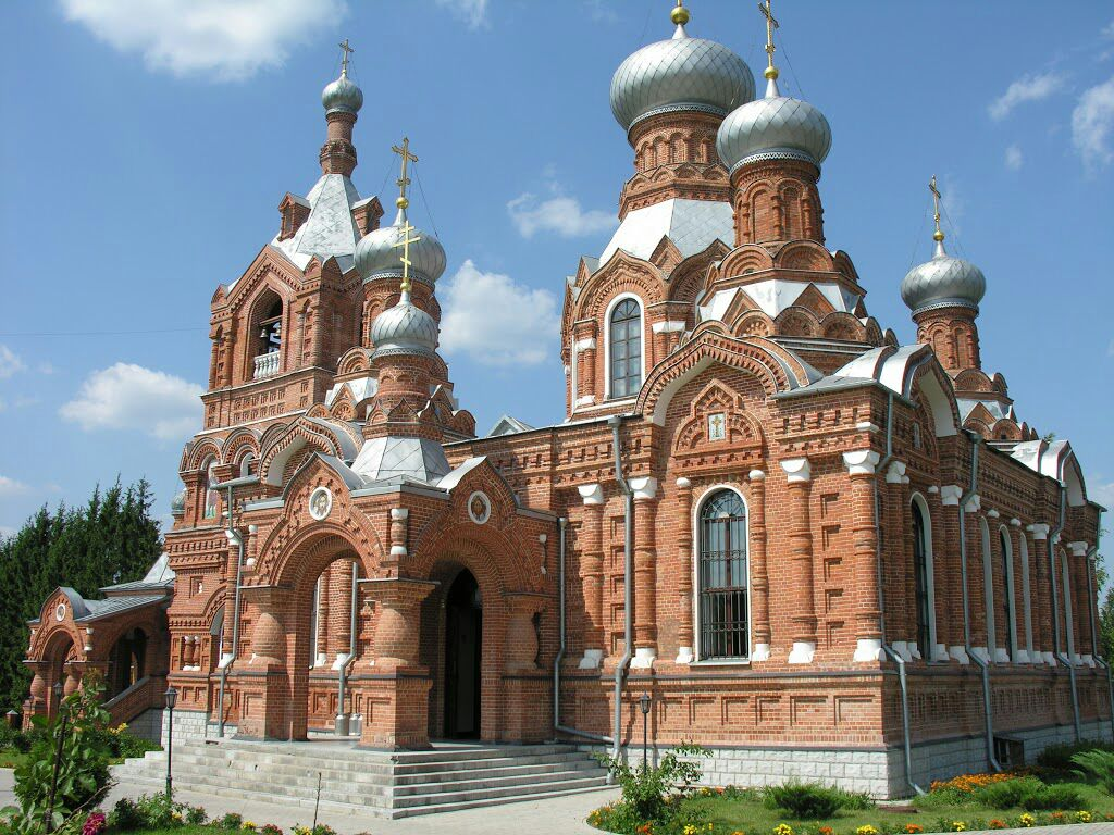 Храм Крестовоздвижения в селе Дарна, 1895 года постройки.